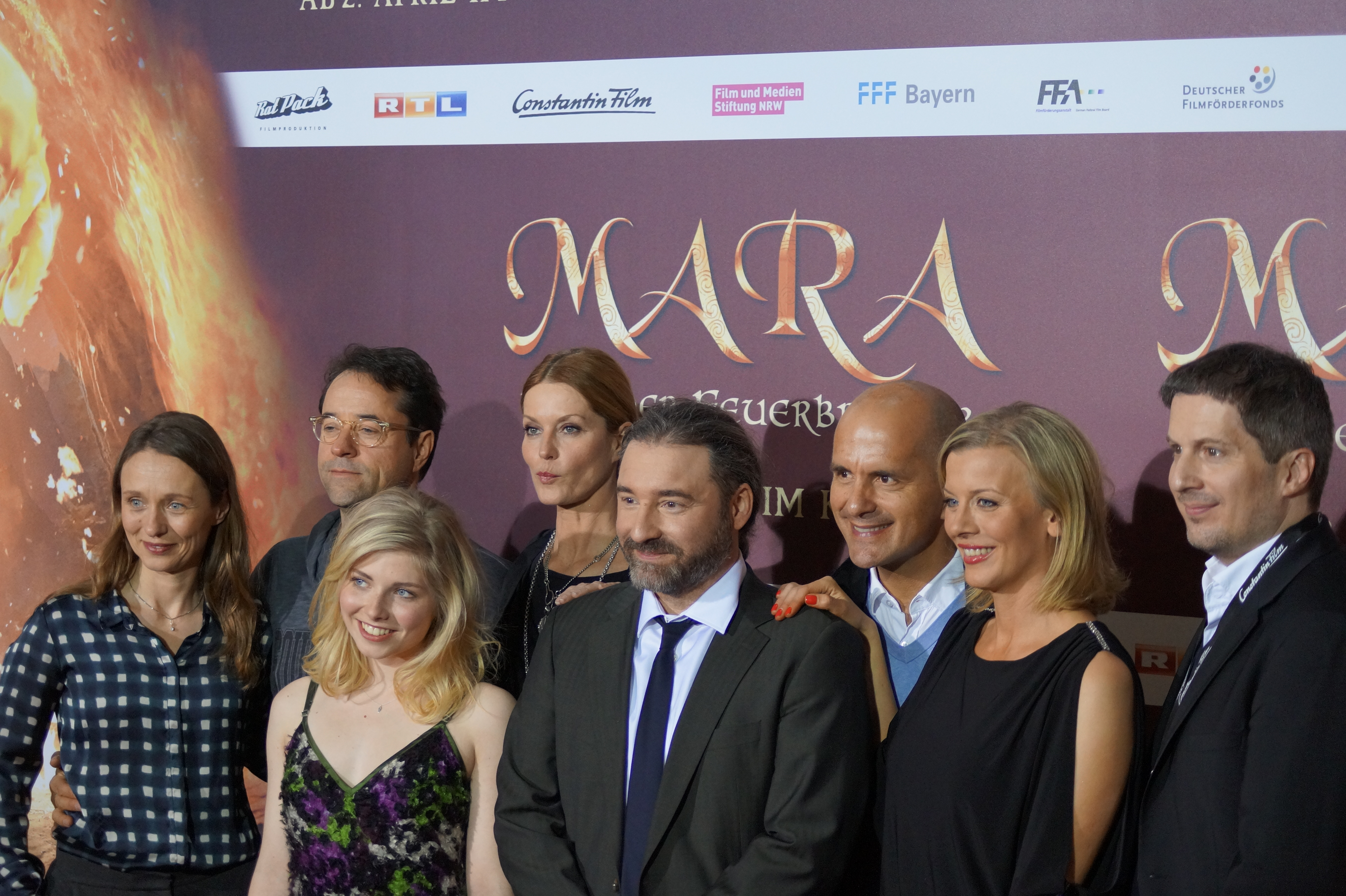 Christina Bentlage (Filmstiftung NRW), Jan Josef Liefers, Lilian Prent, Esther Schweins, Christoph M. Herbst, Regisseur Tommy Krappweis und Eva Habermann, Produzent Christian Becker bei der Deutschlandpremiere von "Mara und der Feuerbringer", am 29. März 2015, im Cinedom Köln